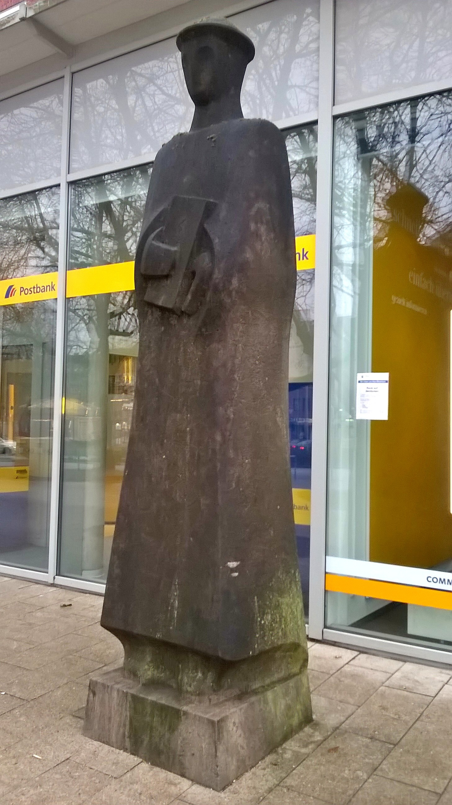 Steinskulptur "Der Bote" von Pierre Schumann, Auftragswerk von 1953, Wandsbeker Schloßstr. 8 in Hamburg-Wandsbek (vor der Filiale der Deutschen Post)